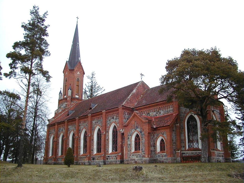 Velēnas baznīca 2001-04-13